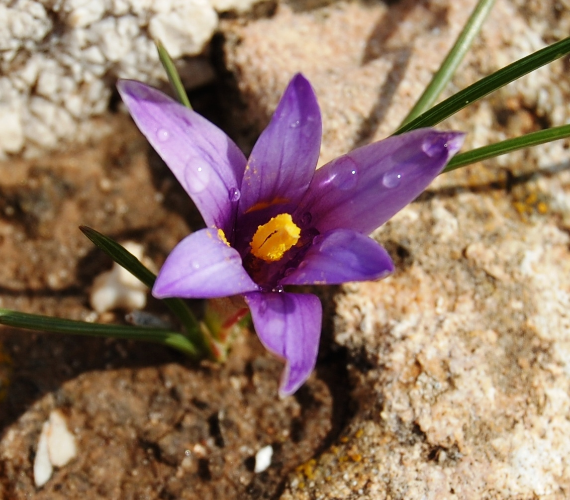 Romulea linaresii Parl. Riserva naturale Monte Cofano, Sicily